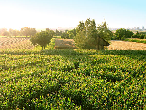 Ditzinger Maislabyrinth, Blick nach Norden